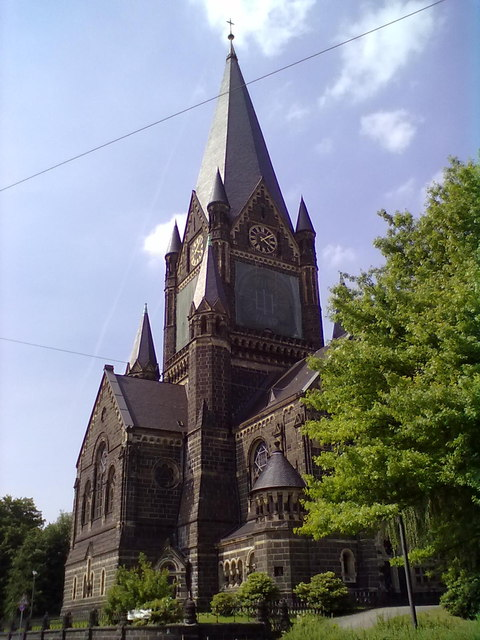 Lutherkirche in Solingen